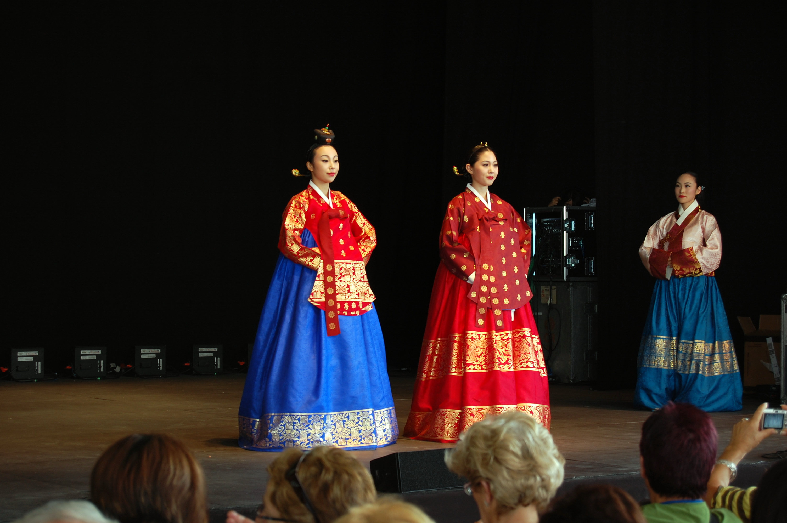 Modelos serias.